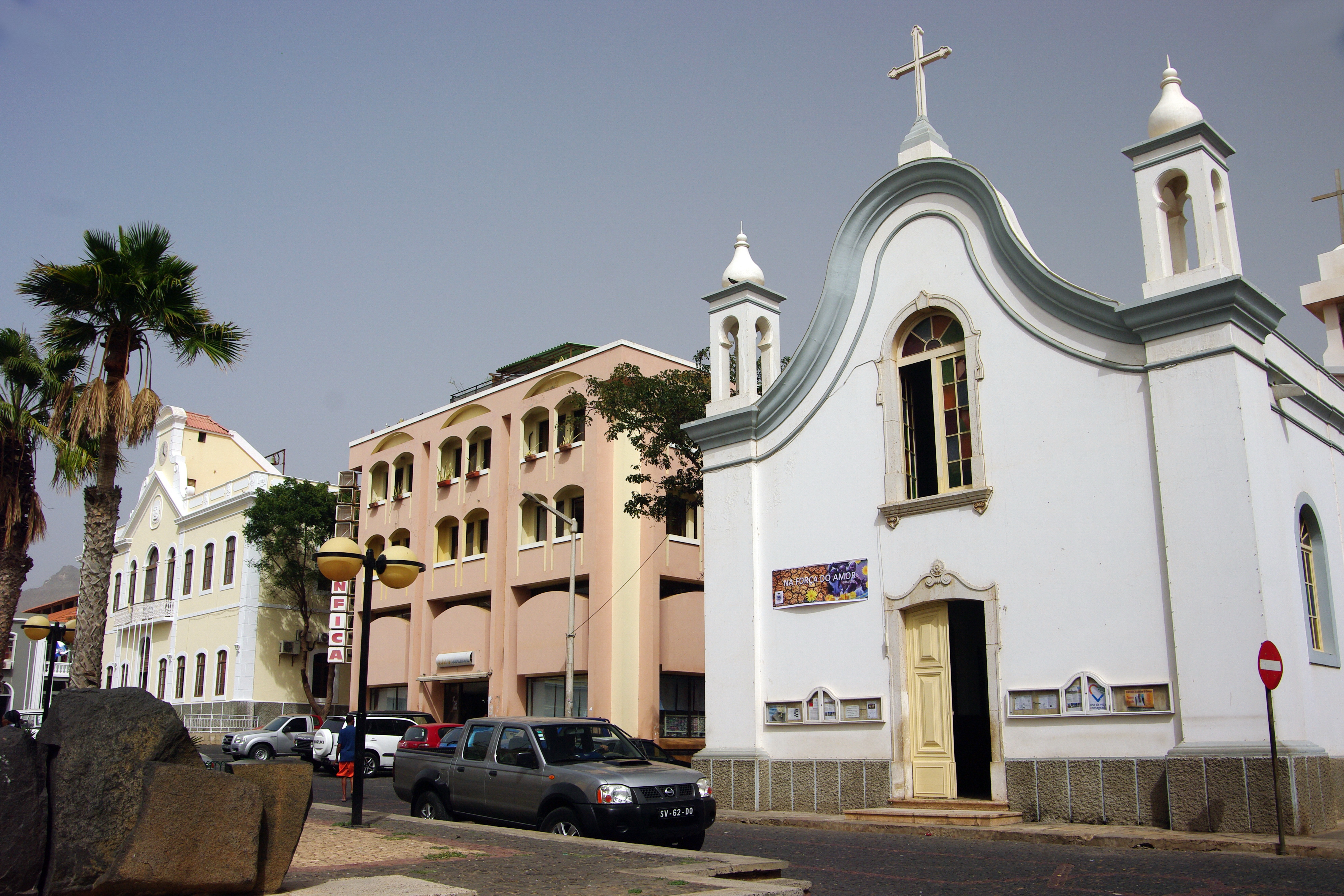 Mindelo, Kirche (links) und Rathaus (rechts)